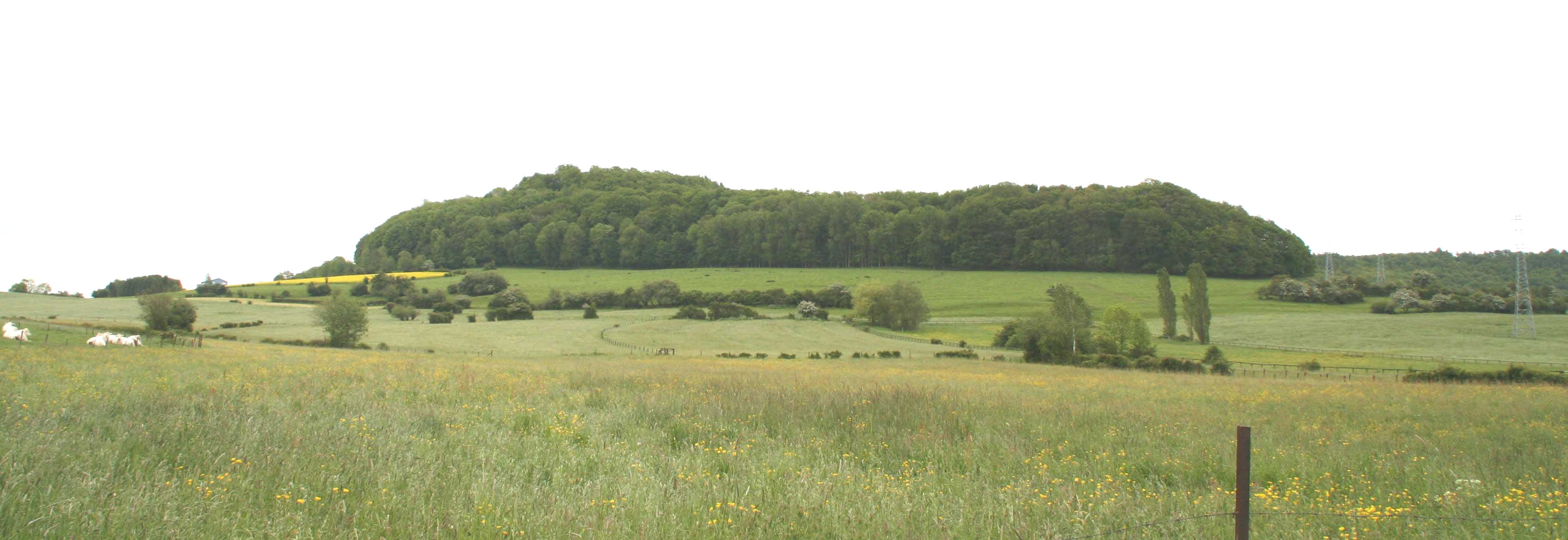 Gehaansbierg zu Diddeleng